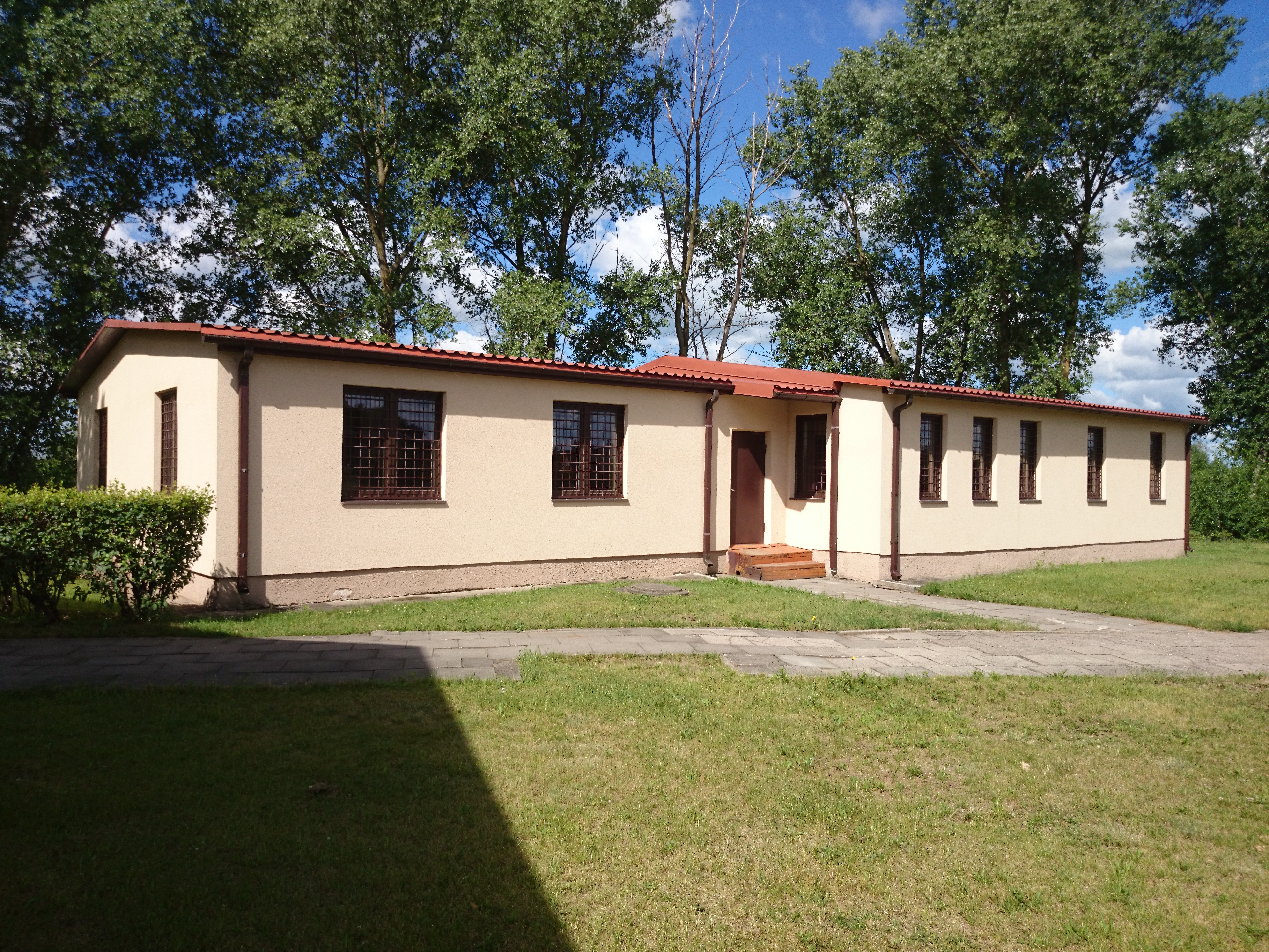 Lietavos pagrindinė mokykla